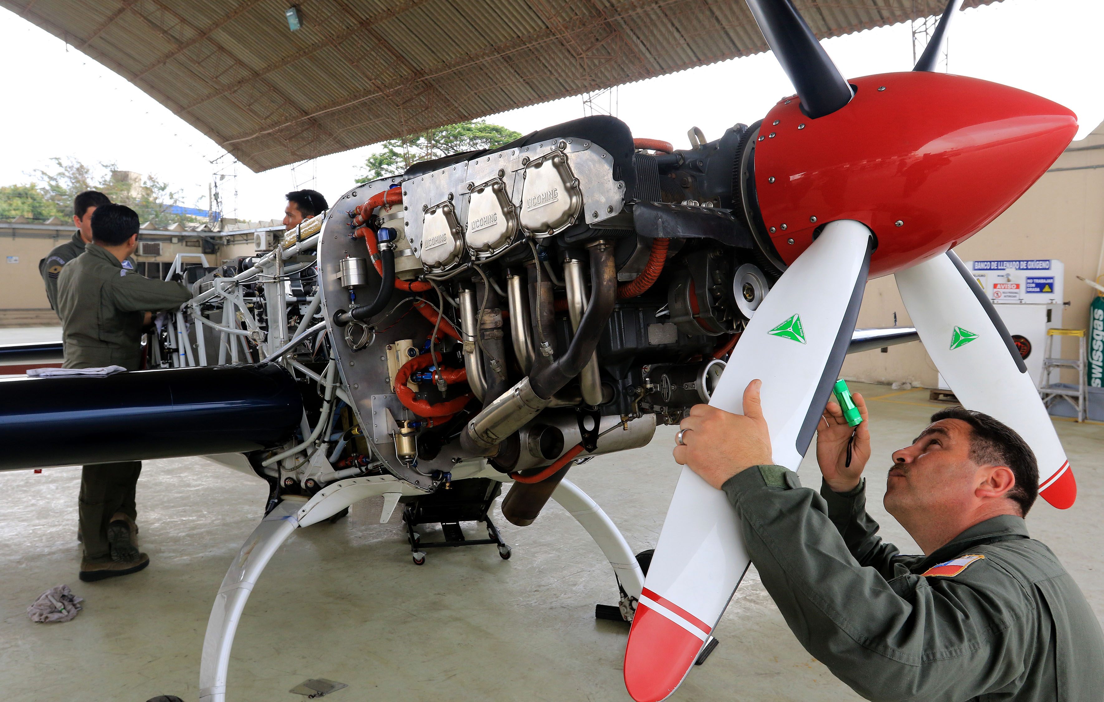 Guayaquil, 14 de Oct. del 2015 (Andes).-La escuadrilla Los Halcones de la Fuerza Aérea de Chile, preparan las aeronaves que participaran del Festival Aéreo que realiza la Fuerza Aérea Ecuatoriana por los XCV aniversario y por los 195 años de Independencia de Guayaquil. Foto:César Muñoz/Andes